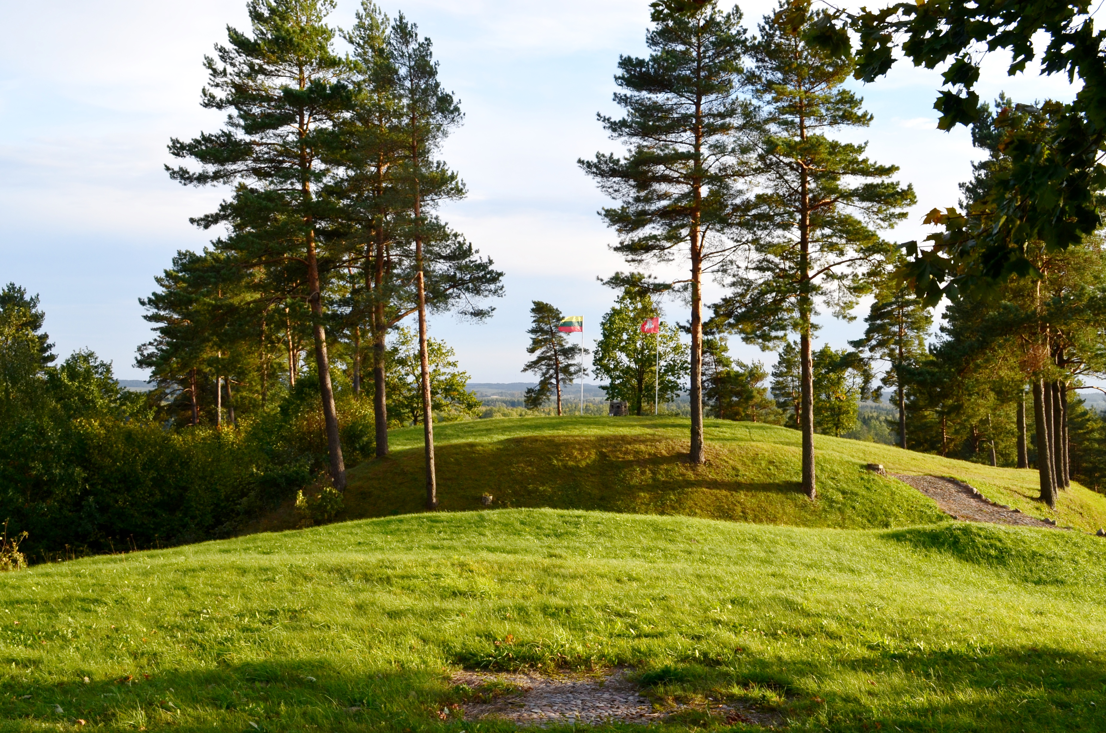 Kepaluškalnis (Kaltinėnų plk.), Šilalės raj.